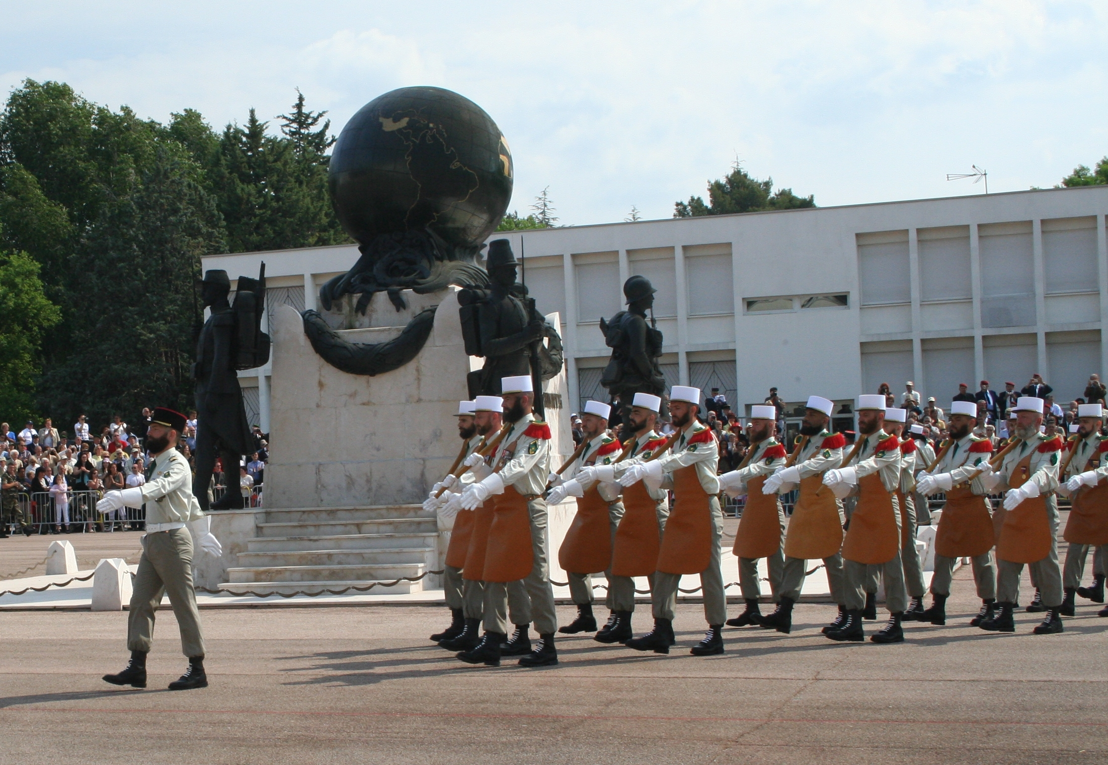 Défilé des pionniers lors de la cérémonie de Camerone au 1er Régiment étranger à Aubagne, le 30 avril 2007